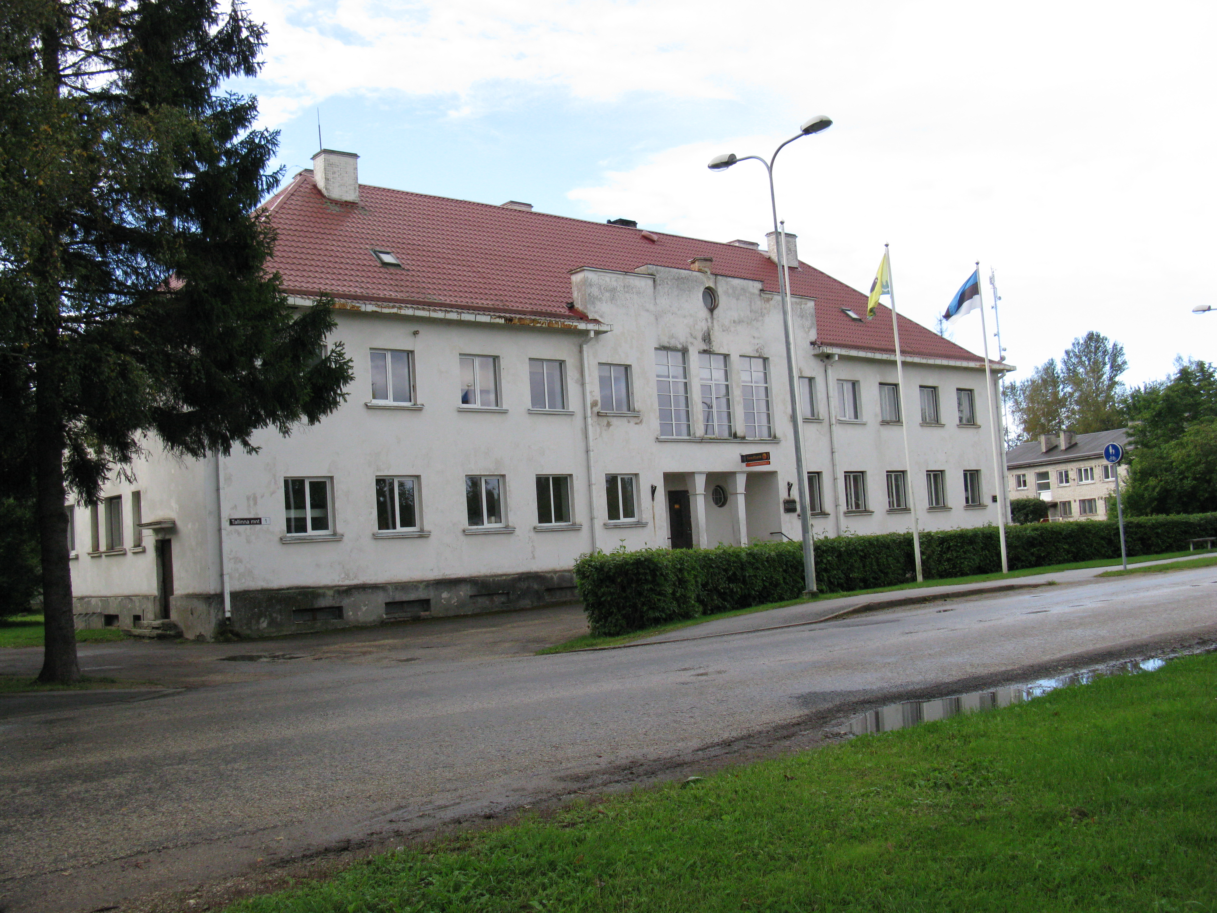 1938. aasta vallamajade arhitektuurivõistluse võidutöö alusel 1939-1940 ehitatud Puurmani vallamaja